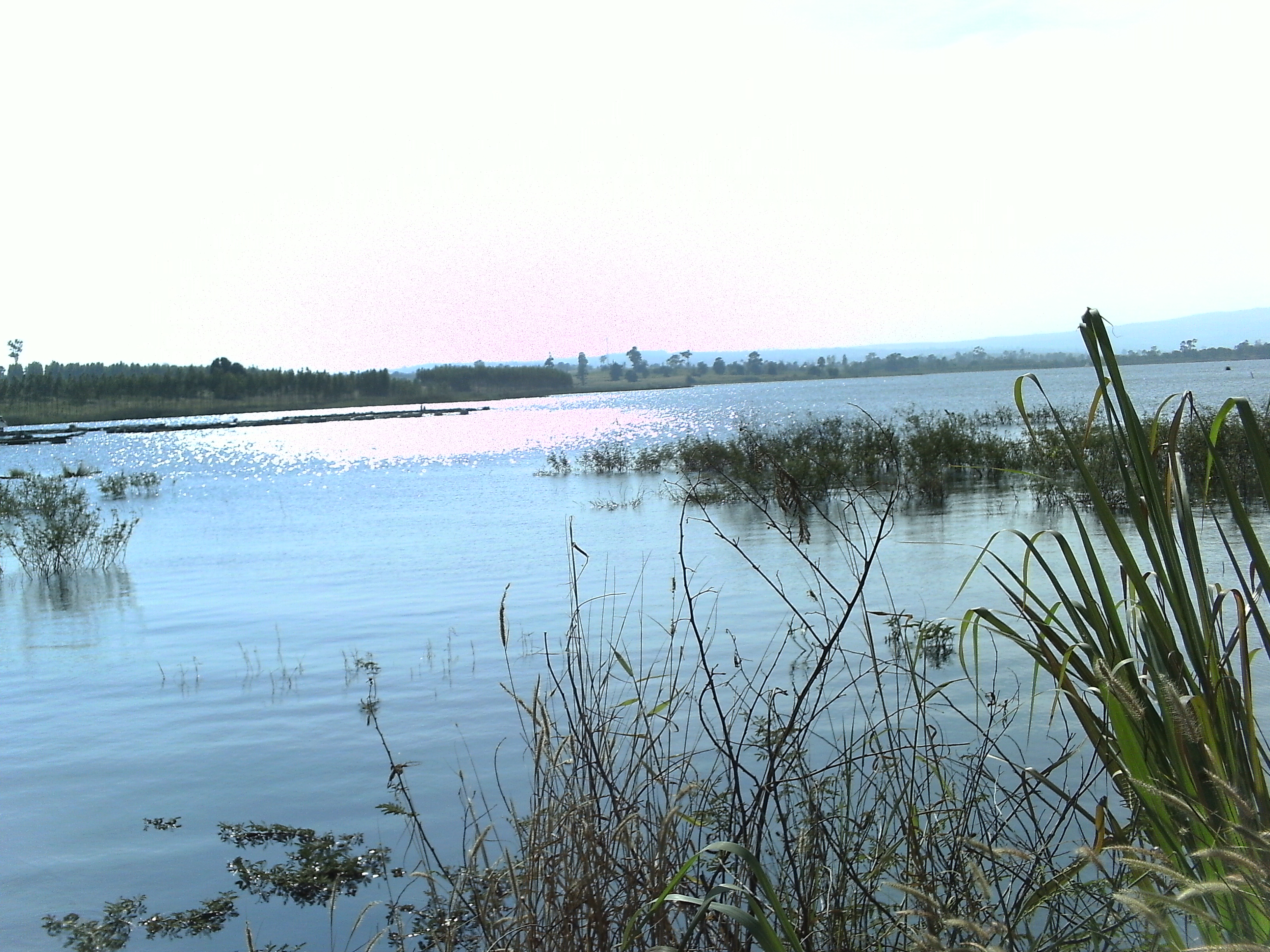 เขื่อนลำปะทาว